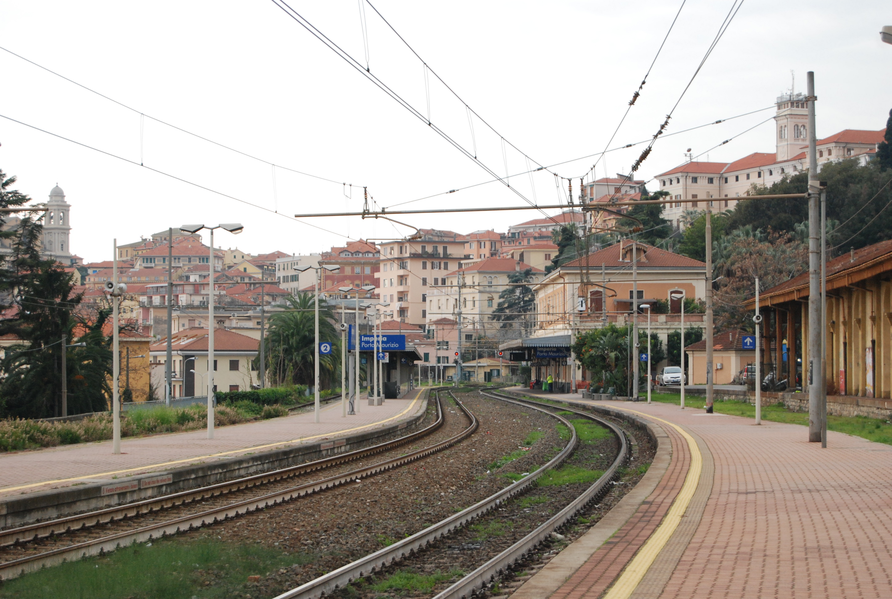 Stazione di Imperia Porto Maurizio